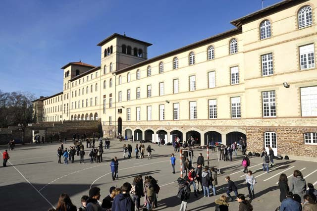 Collège Saint-Vincent de Rennes